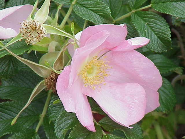 Species: Rosa rugosa cultivar Family: Rosaceae Cultivar: 'Fru Dagmar Hastrup', Poulsen 1914 Image No. 2